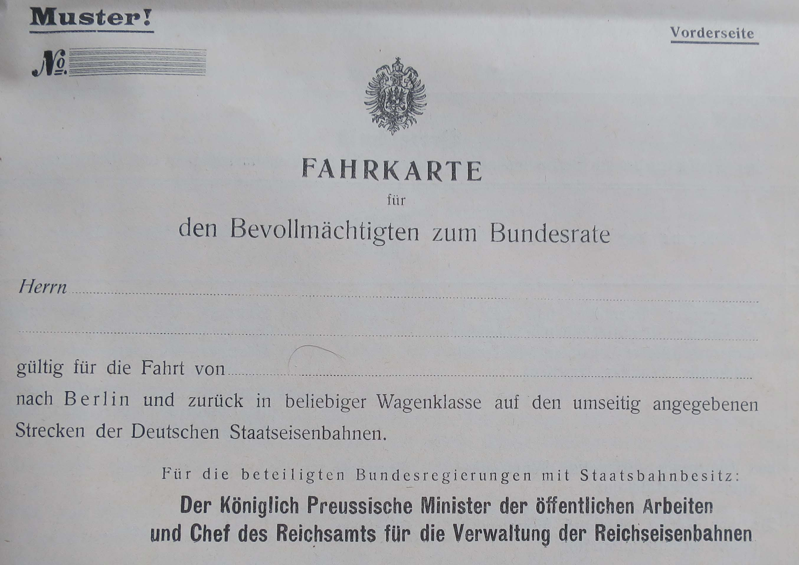 Muster einer Freifahrkarte für einen Vertreter beim Bundesrat, 1912. Quelle: Eisenbahndirektion Mainz (Hg.): Amtsblatt der Königlich Preußischen und Großherzoglich Hessischen Eisenbahndirektion in Mainz vom 30. November 1912, Nr. 60. Bekanntmachung Nr. 718, S. 447f.